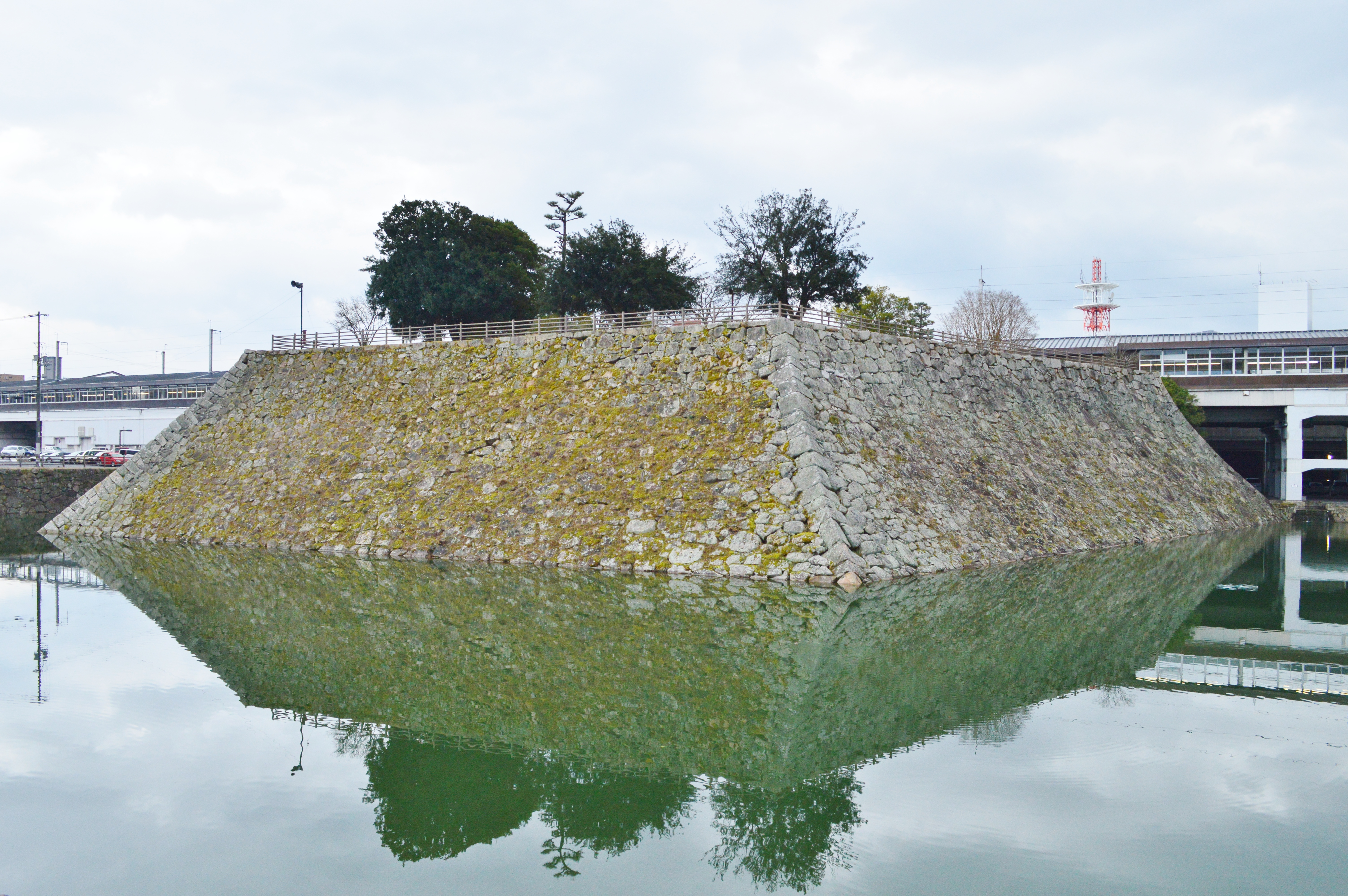 三原城 天守台